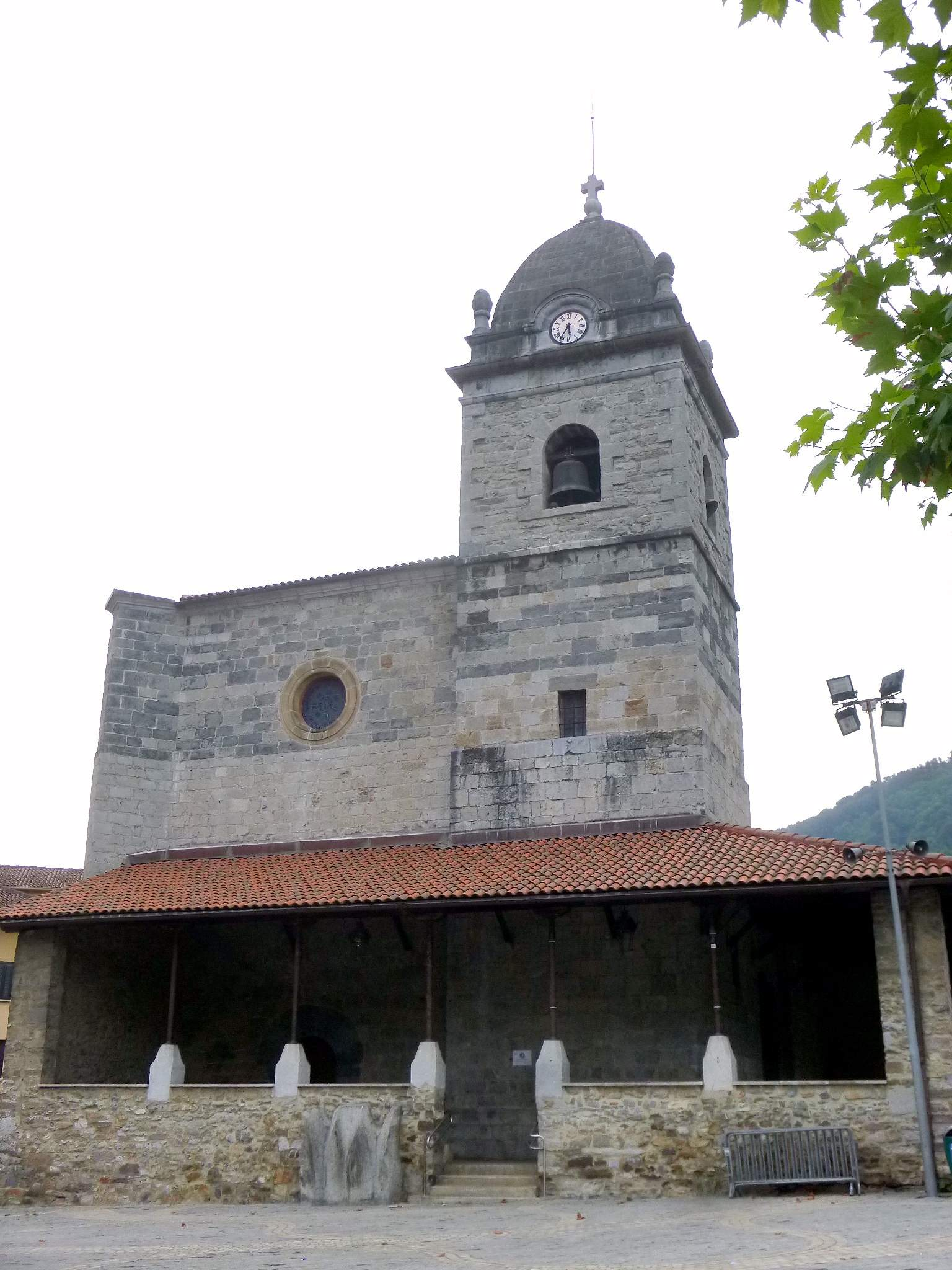 Iglesia de San Miguel Arcángel (Irura, Guipúzcoa)